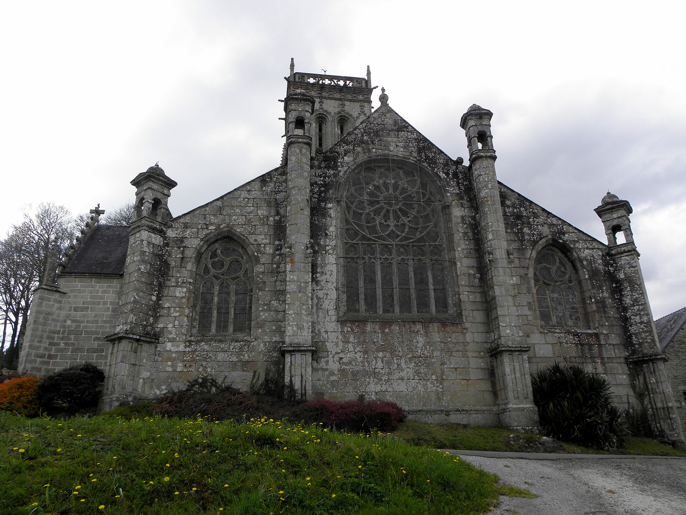 Chevet de la chapelle Saint-Herbot en Plonévez-duFaou (29).